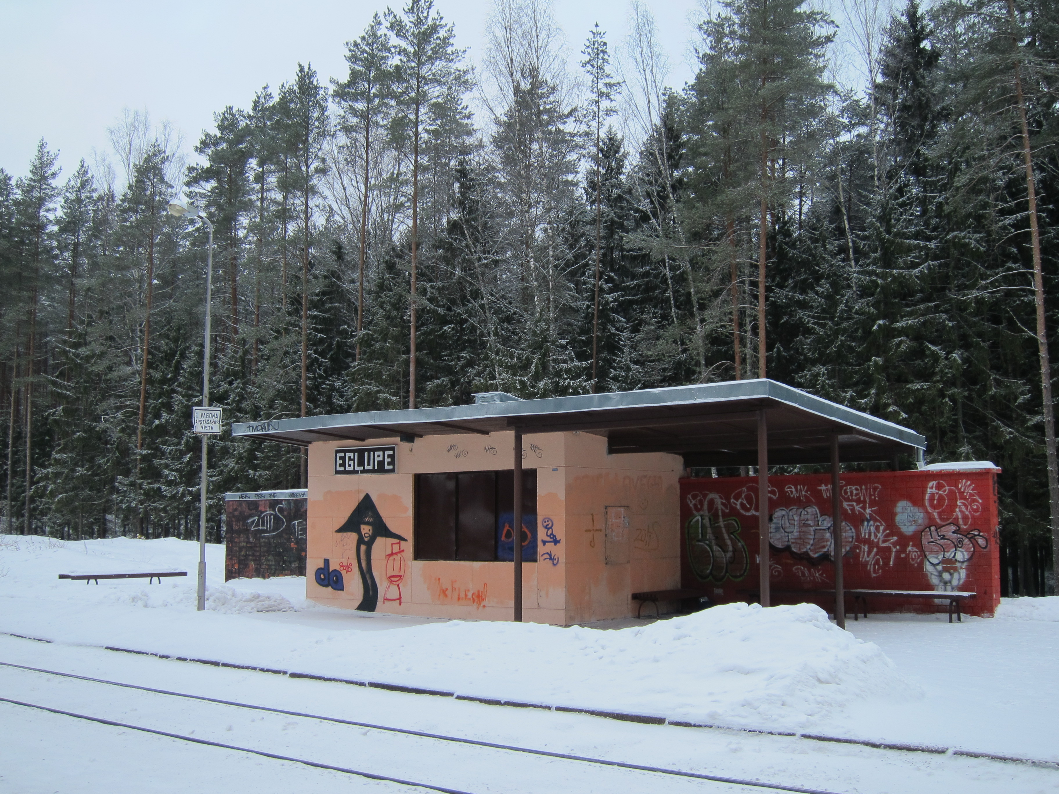 Пассажирский павильон платформы Эгльупе